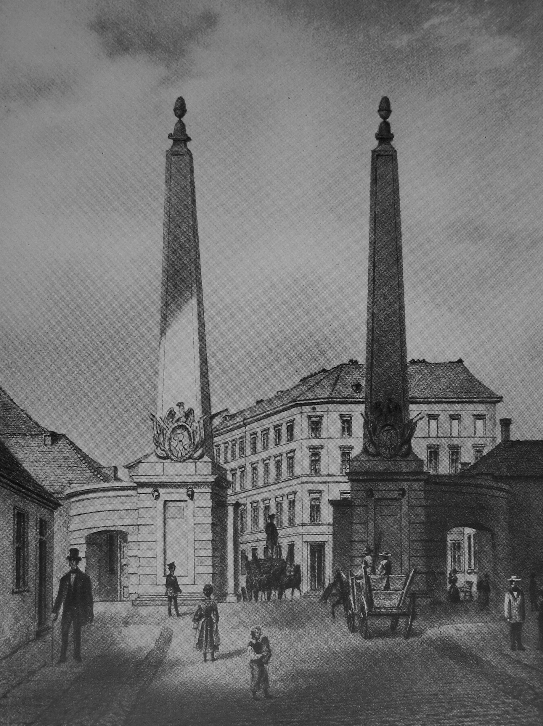 Berliner Zollmauer: Hamburger Tor um 1860; Berlin/Germany